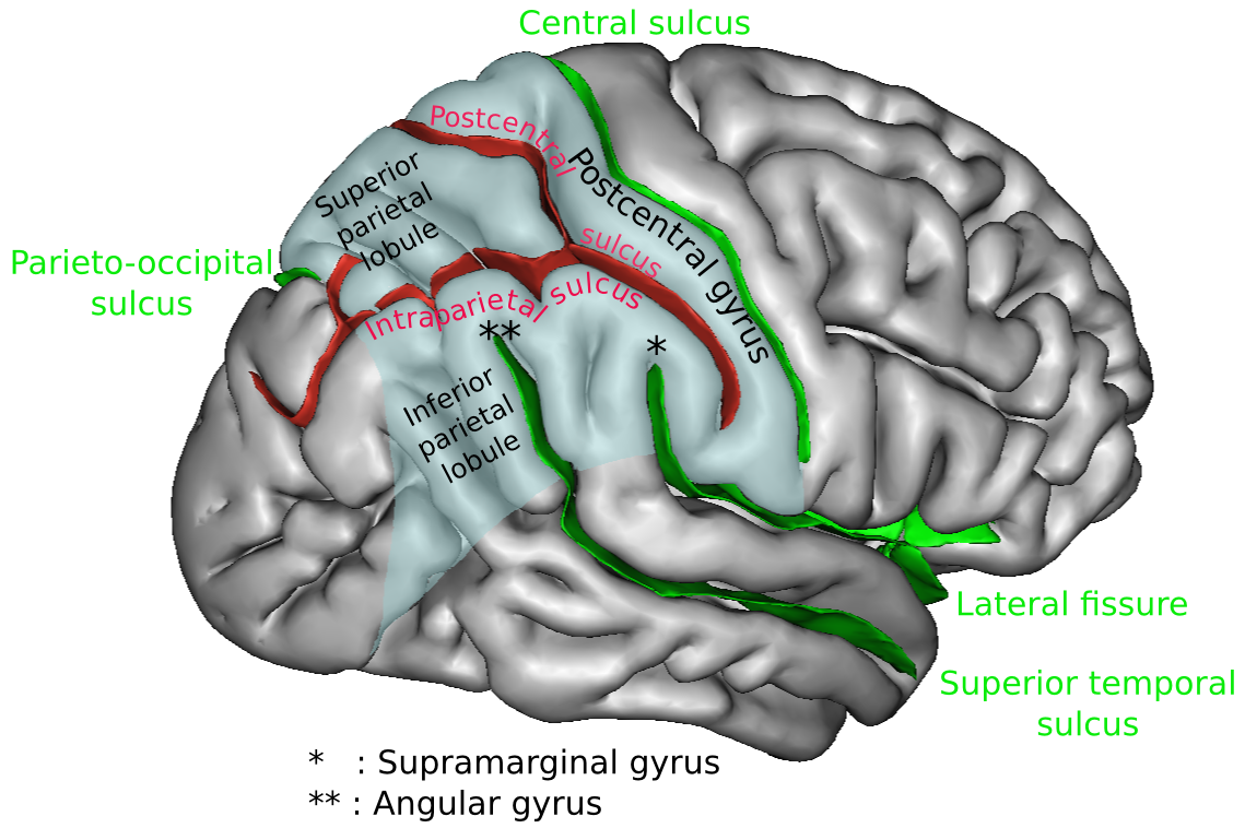 Lateral surface of parietal lobe. Gyri and sulci.